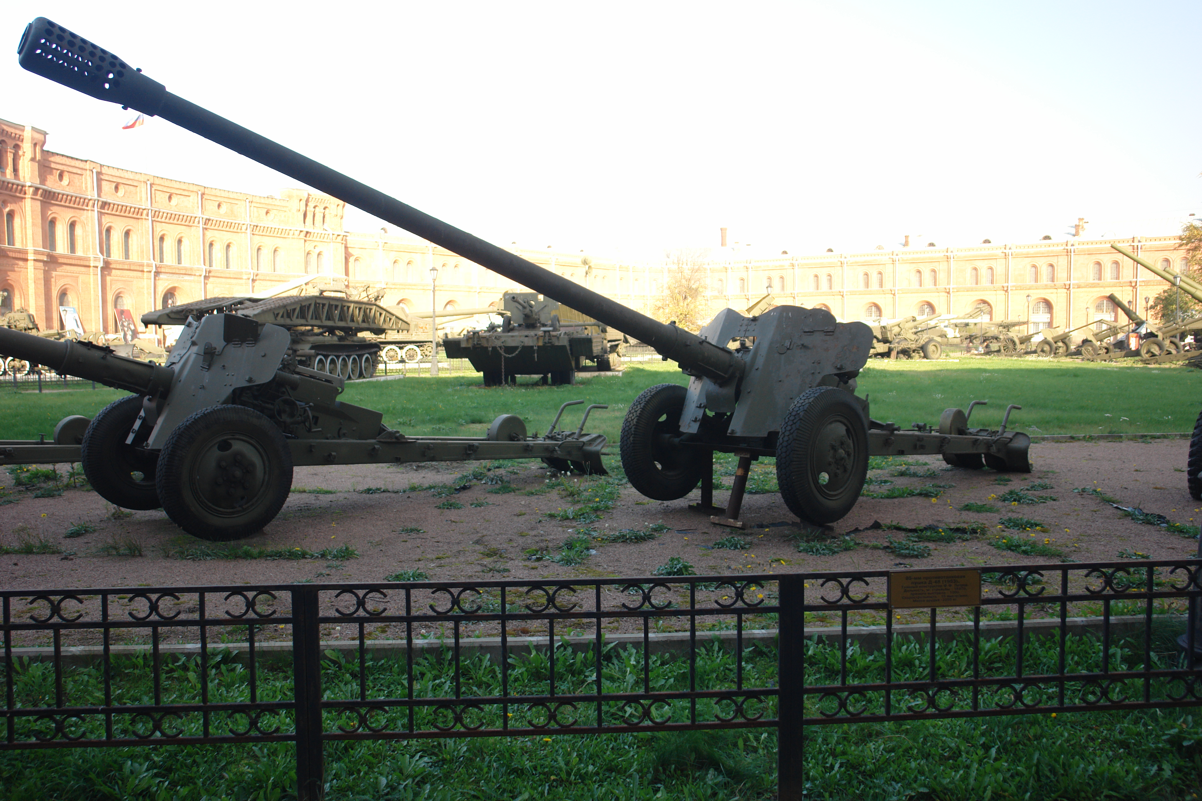 85-мм противотанковая пушка Д-48 (1953). Главный конструктор Ф.Ф. Петров Дальность, м: стрельбы - 18970, прямого выстрела - 1200. Скорострельность - 15 выстр/мин Масса орудия -2350 кг. Военно-исторический музей артиллерии, инженерных войск и войск связи, Санкт-Петербург.